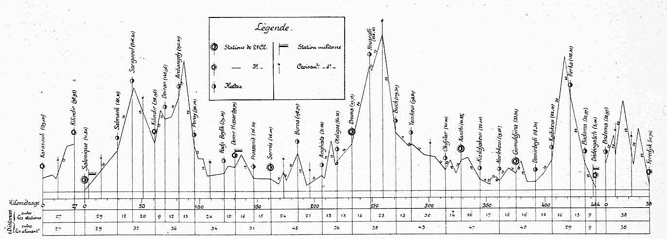 Längsprofil des Netzwerkes der Compagnie du Chemin de Fer Ottoman Jonction Salonique-Constantinople